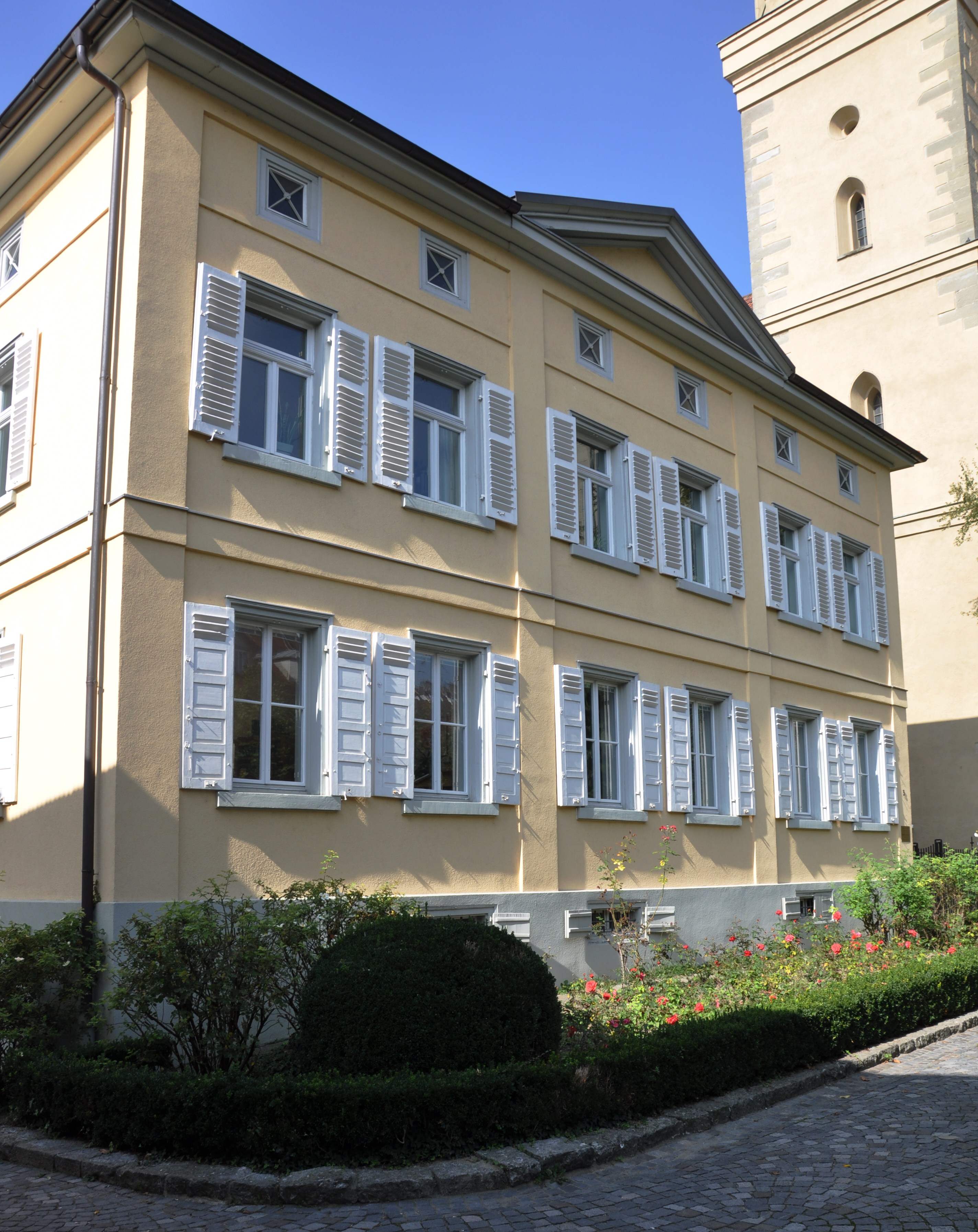 Ravensburg, Marienplatz 3 (Evangelisches Pfarramt und Dekanat)